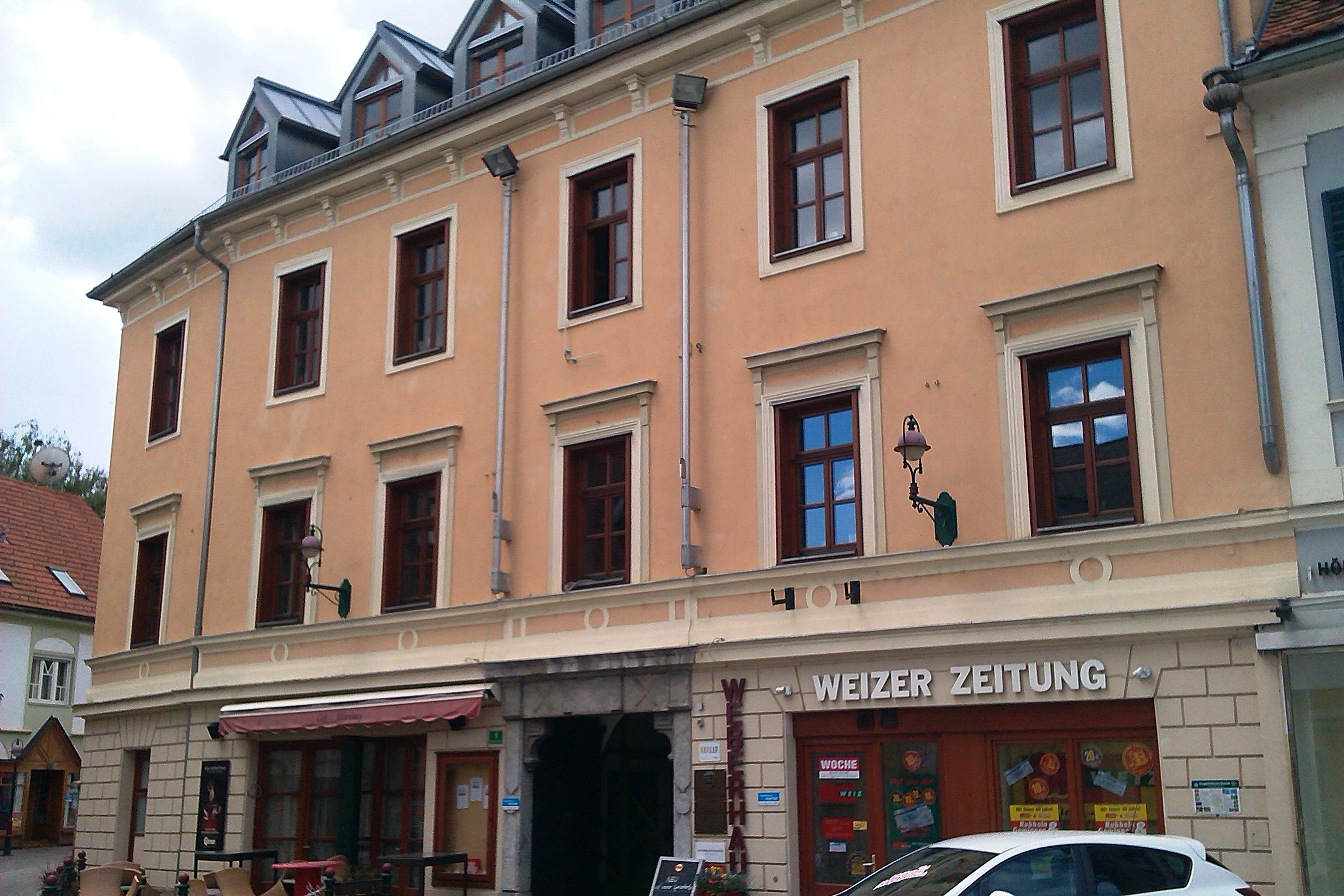 Kulturhaus Weberhaus